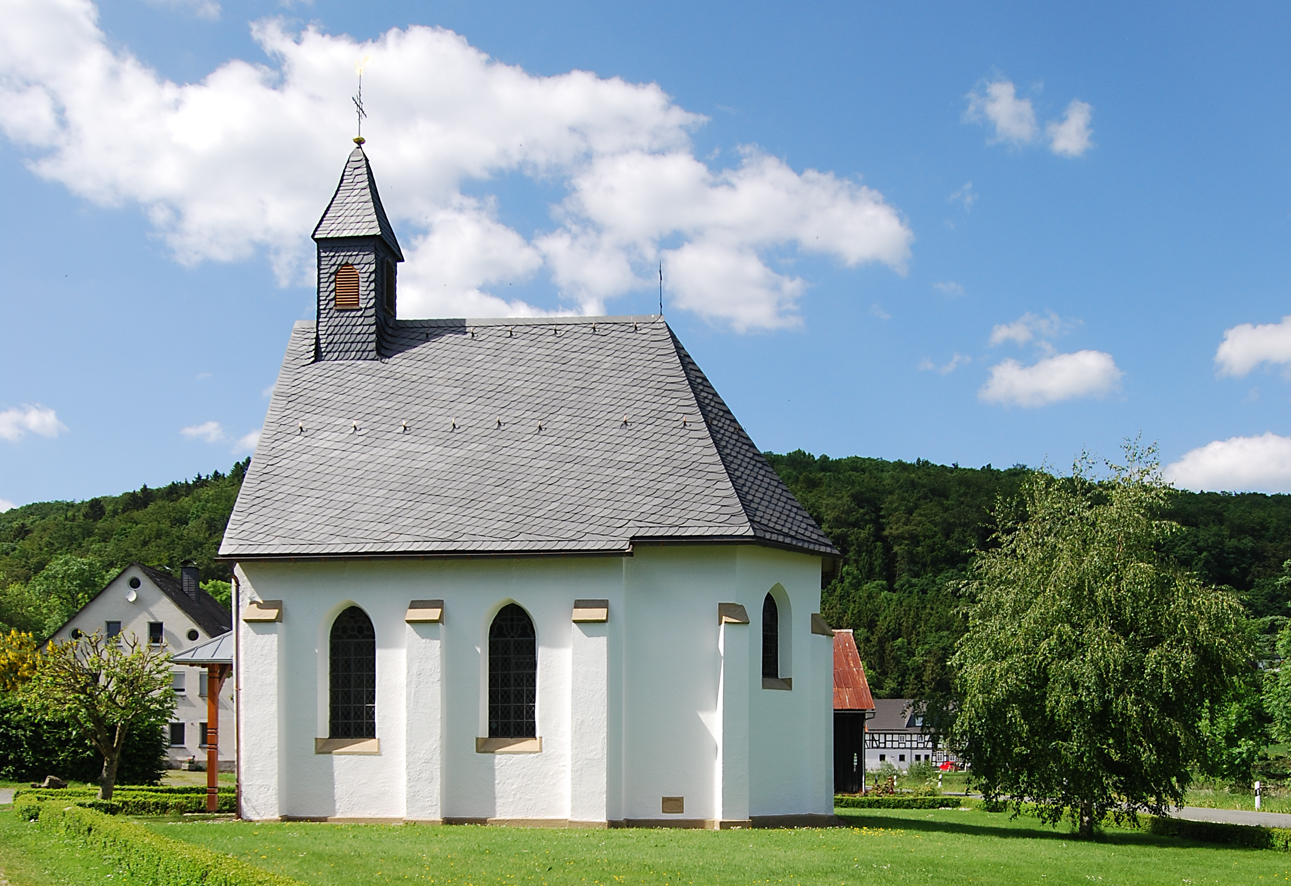 Kapelle St. Laurentius in Glindfeld (Glindfeld 19) im Ortsteil Medelon der Stadt Medebach im Hochsauerlandkreis in Nordrhein-Westfalen This is a photograph of an architectural monument.